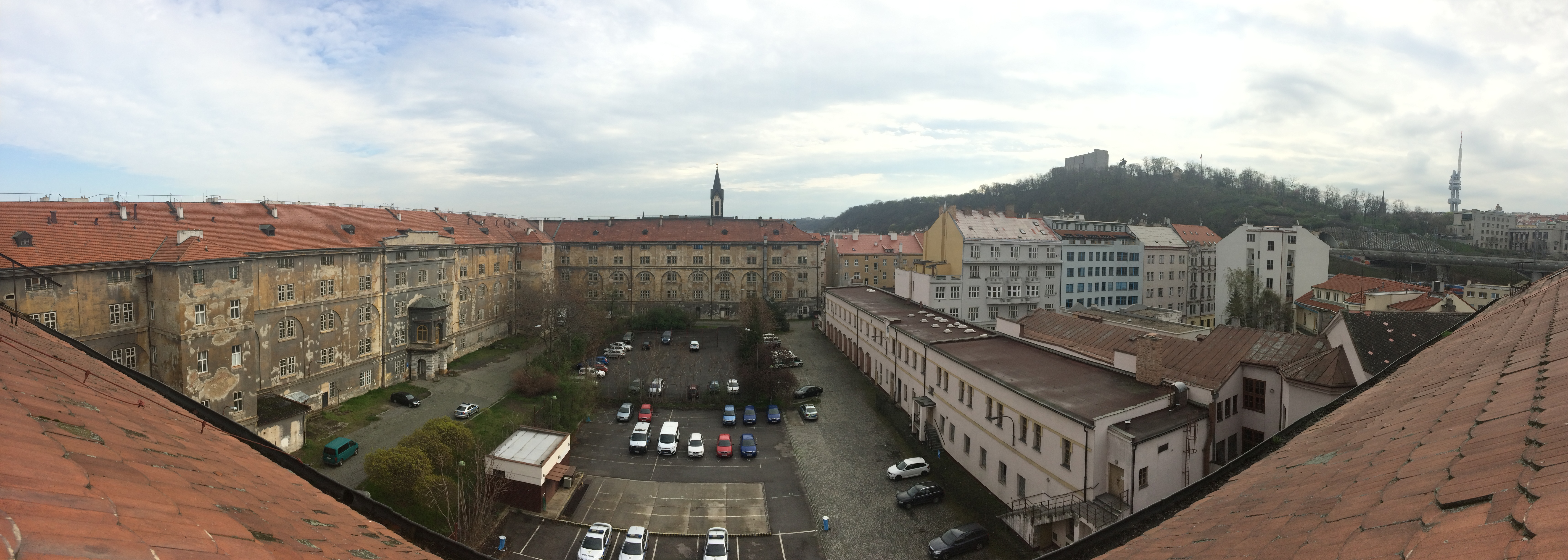 Karlínská kasárna - panorama z půdy západního křídla